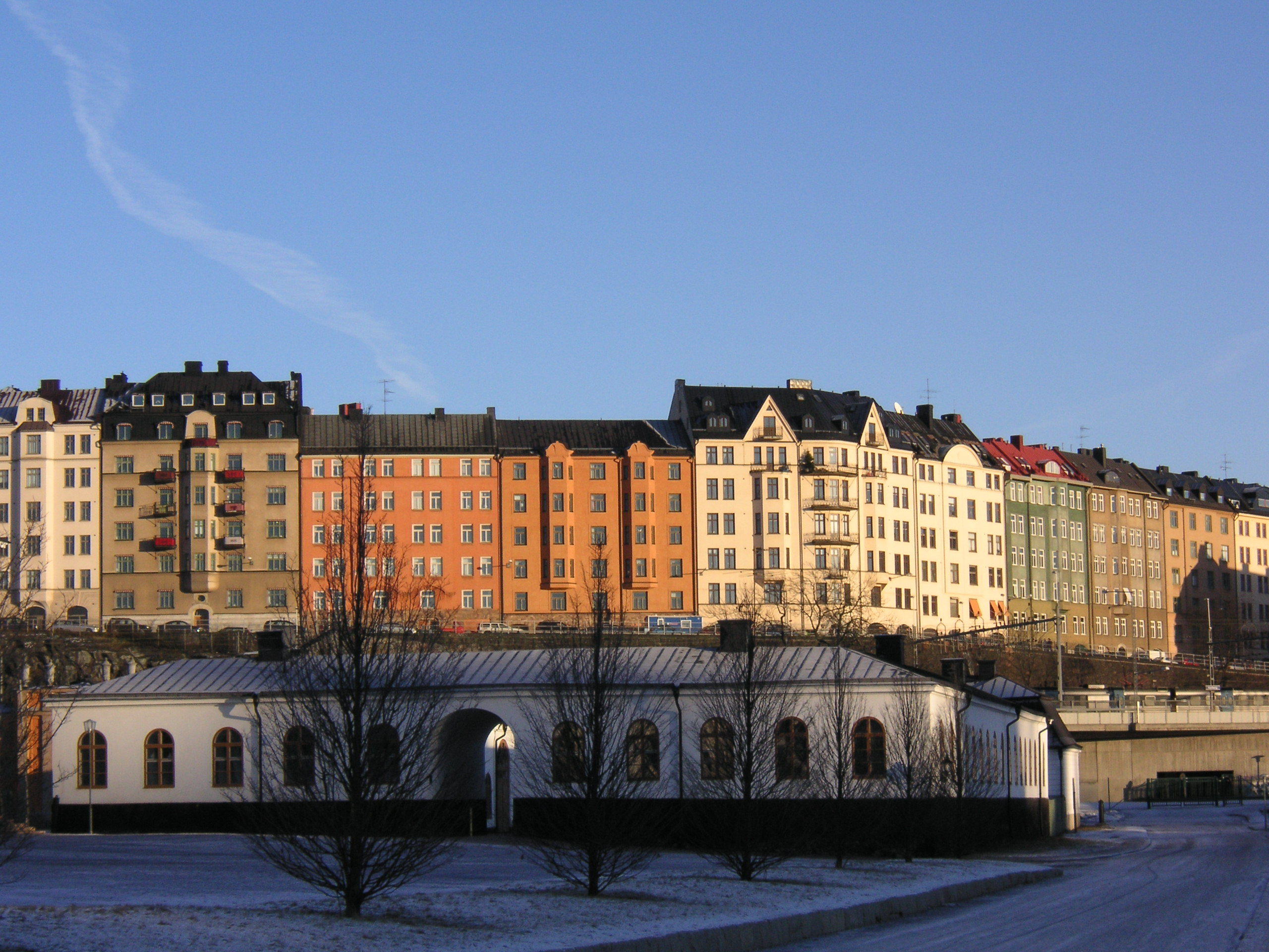 Vasastadens gräns mot söder vid Rörstrandsgatan